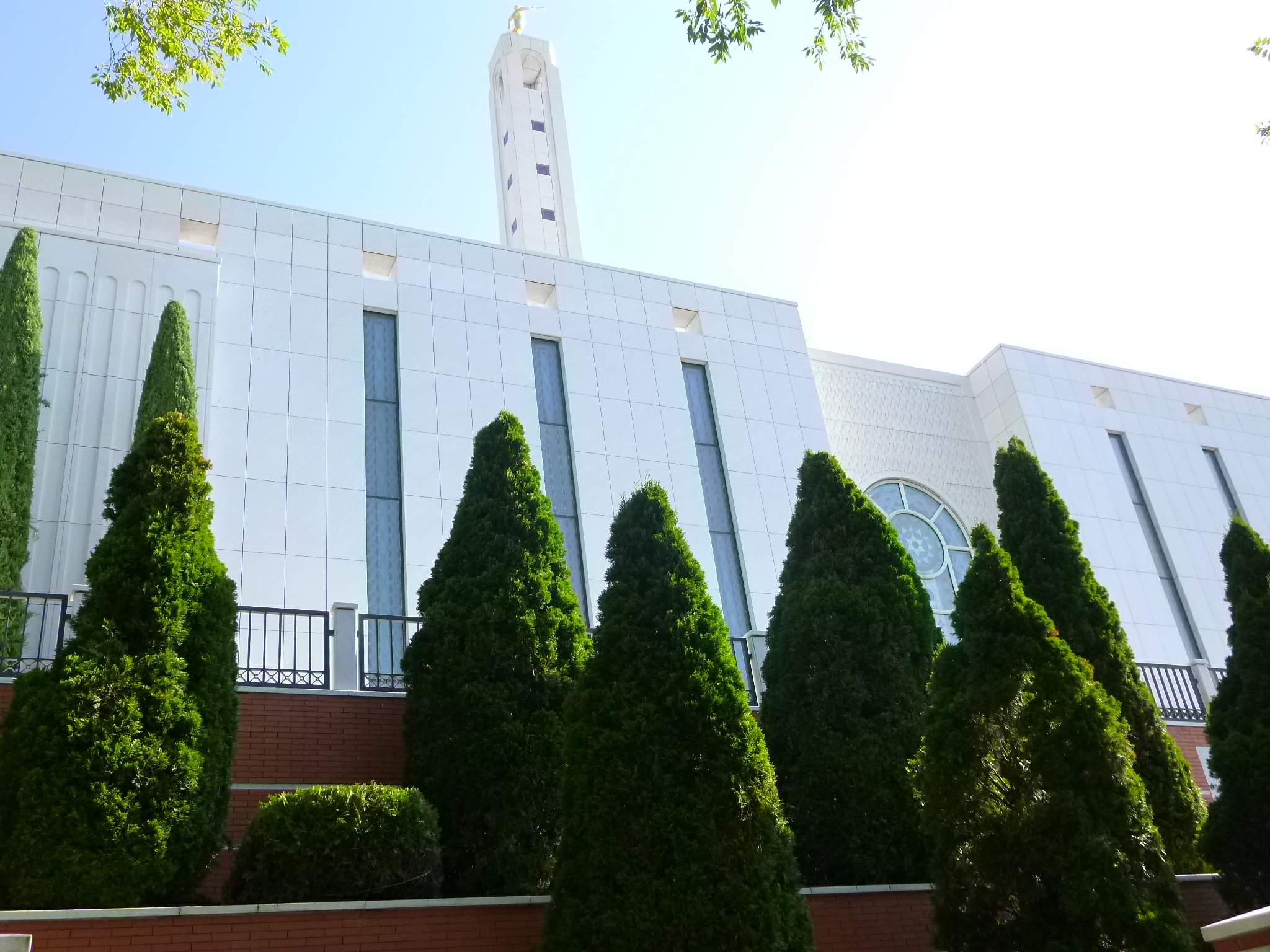 Templo Mormón en el barrio de Moratalaz de Madrid